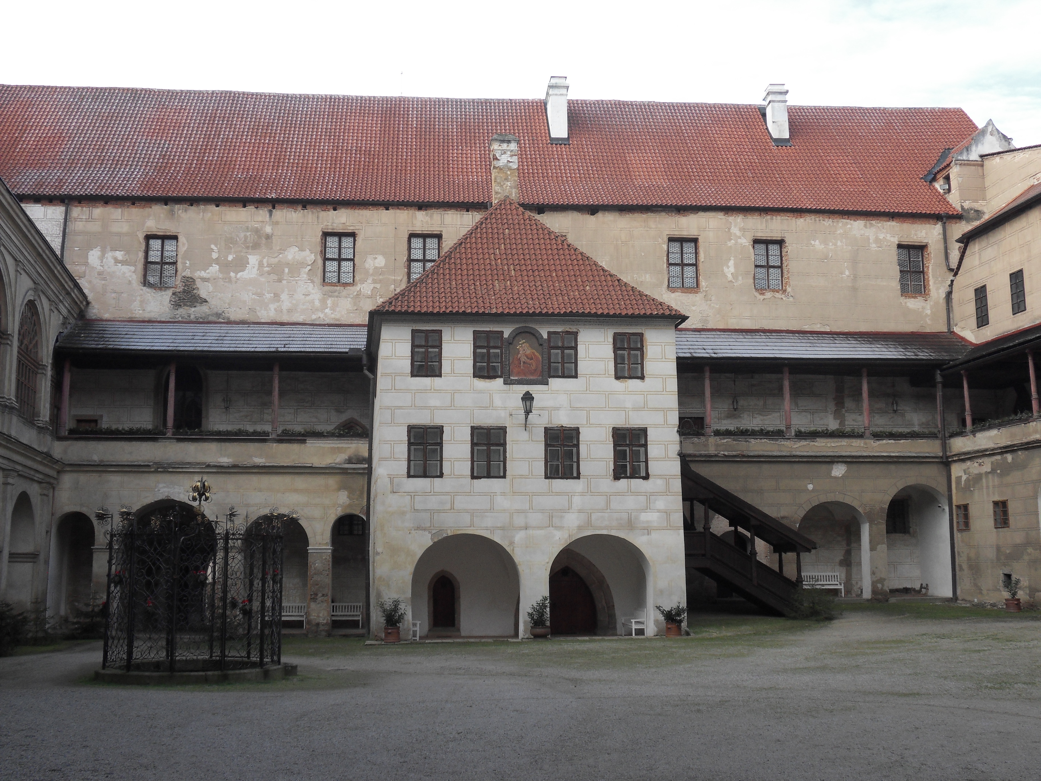 Zámek Horšovský Týn- pohled na západní část zámeckého nádvoří